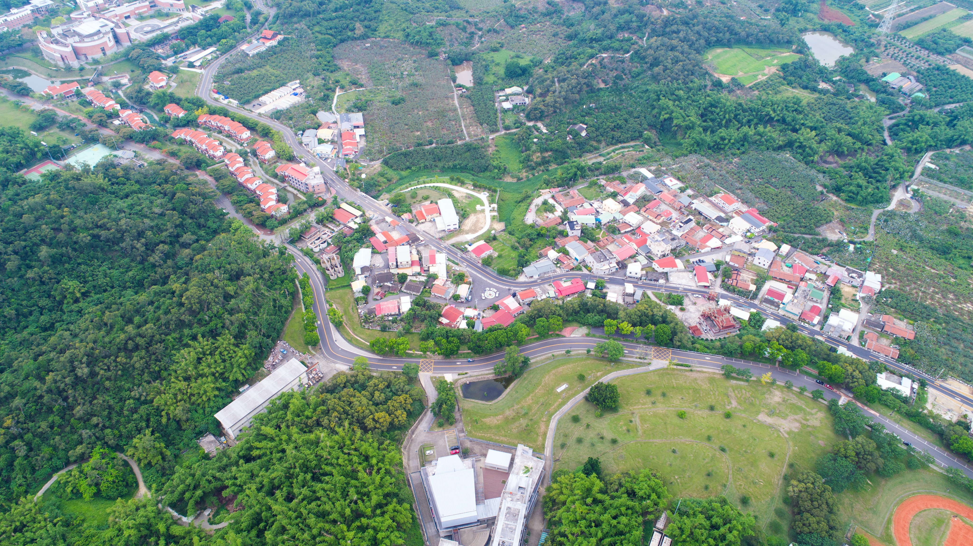 中文（台灣）: 官田、大崎 ( 南111鄉道、台南藝術大學 )